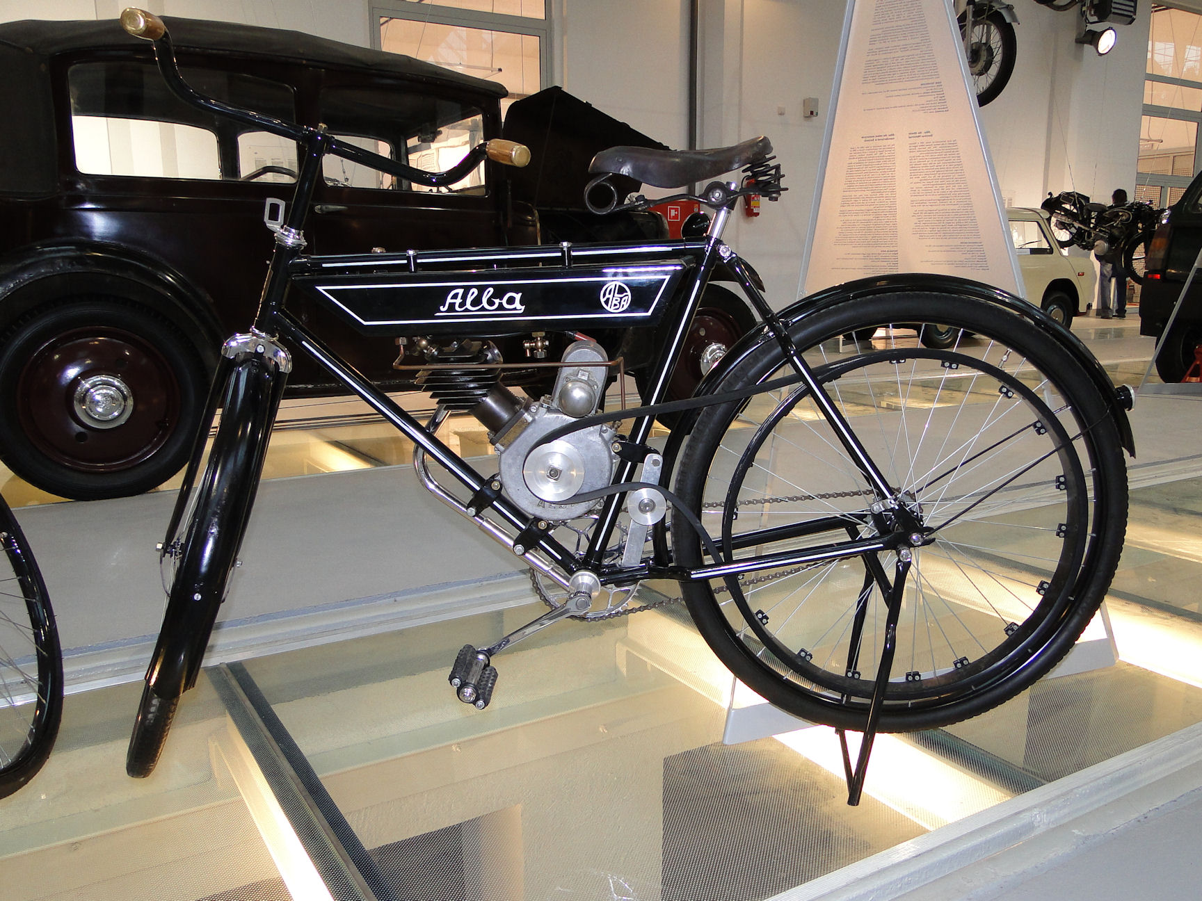 Motocykl Alba z 1919 roku, wyprodukowany w podszczecińskim Mierzynie. Eksponat nie posiada gaźnika i iskrownika oraz manetek: gazu, zapłonu i hamulca na kierownicy.